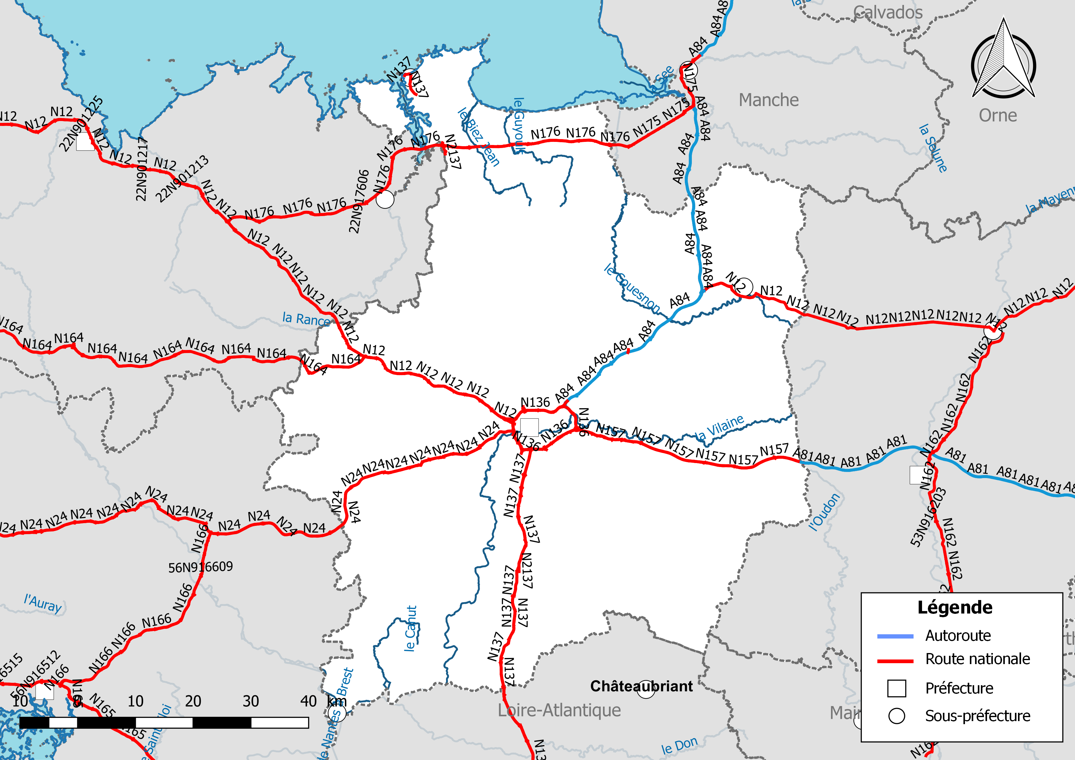 Carte du réseau routier national, constitué des autoroutes et des routes nationales, dans le département de l'Ille-et-Vilaine (France). Situation au 1er janvier 2019.